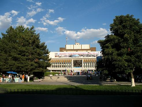 Дворец культуры и техники авиастроителей Им. В.Н. СИВЦА